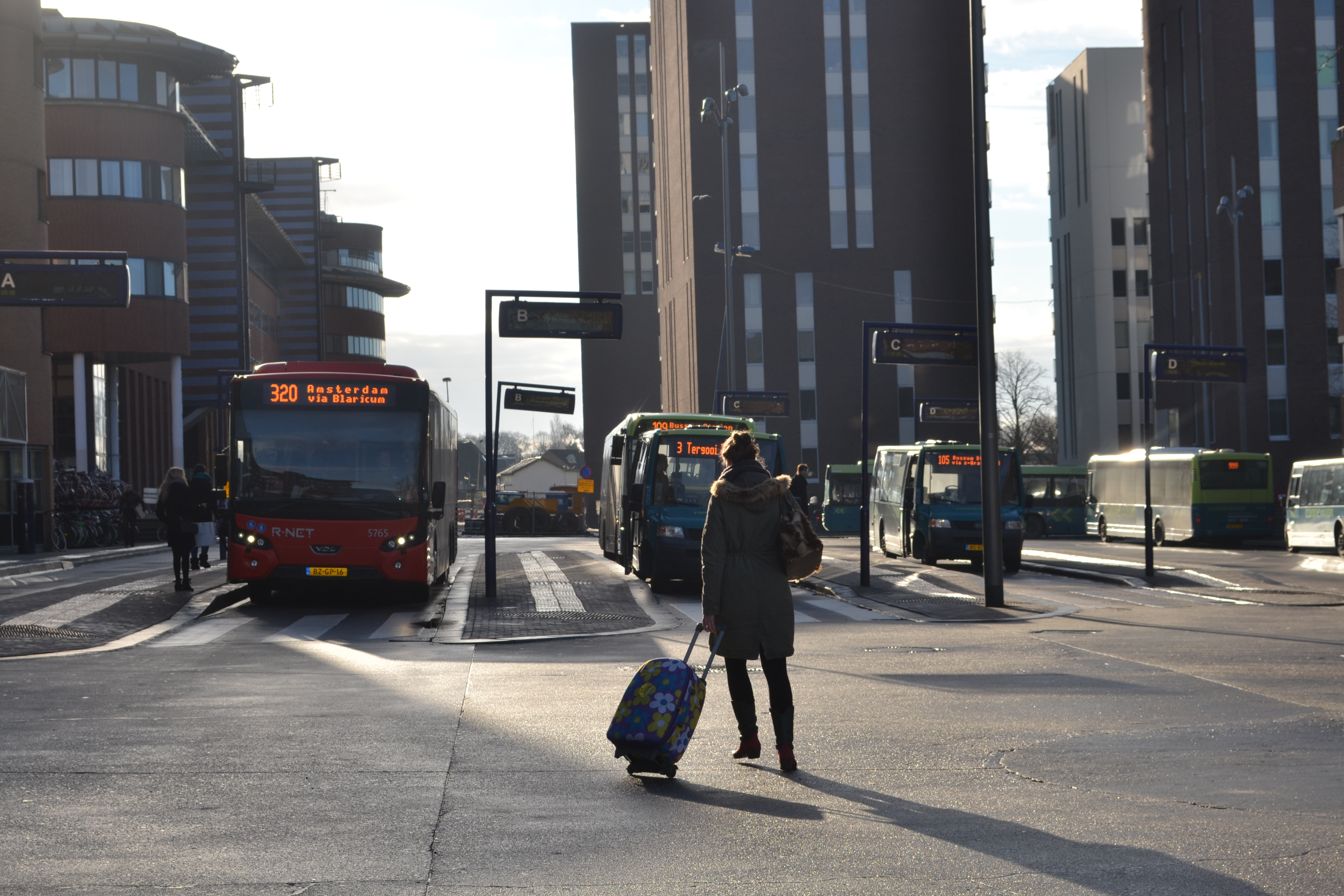 Busstation Hilversum, 8 februari 2013